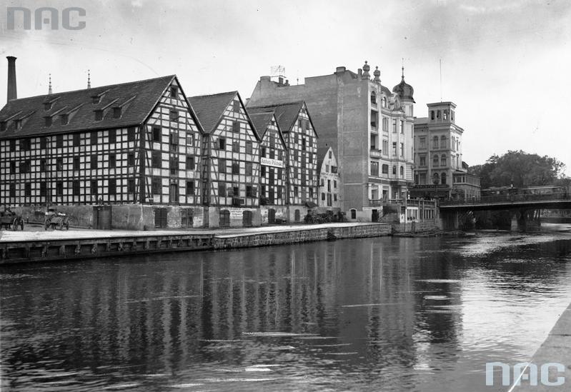 Stare spichrze zbożowe nad Brdą w 1925 roku